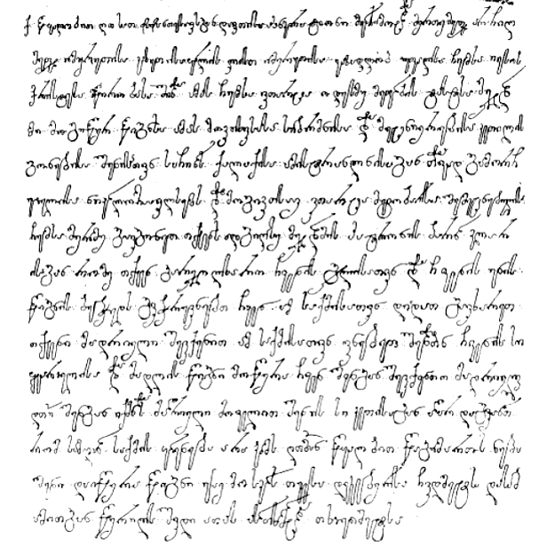 Archili_Letter_to_Nicolaes_Witsen, Noord and Oost Tartarye, 1705, 524